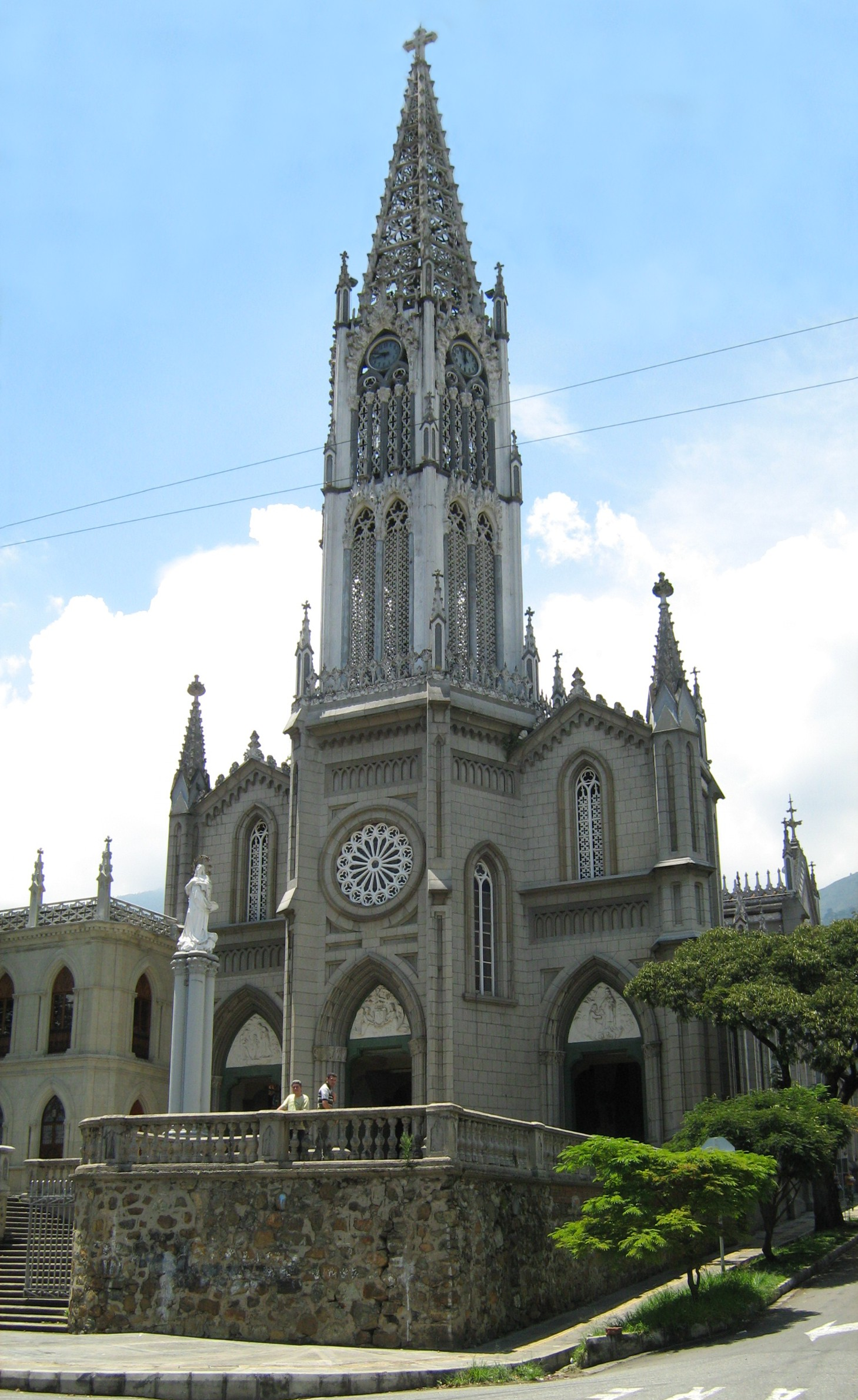 Iglesia del Señor de las Misericordias, Medellín, Antioquia